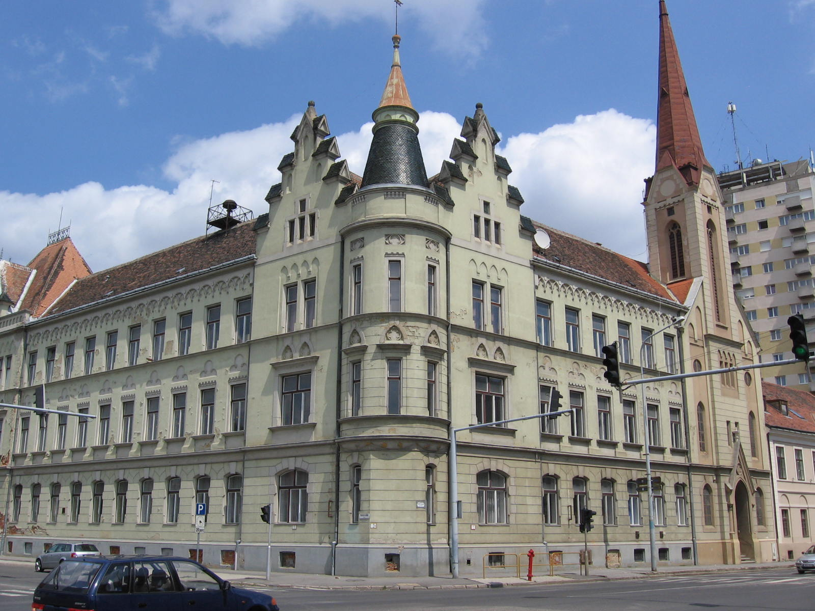 Szombathelyi, volt domonkos leányiskola és Szent Norbert zárdatemplom (Petőfi Sándor utca 37.)[1]